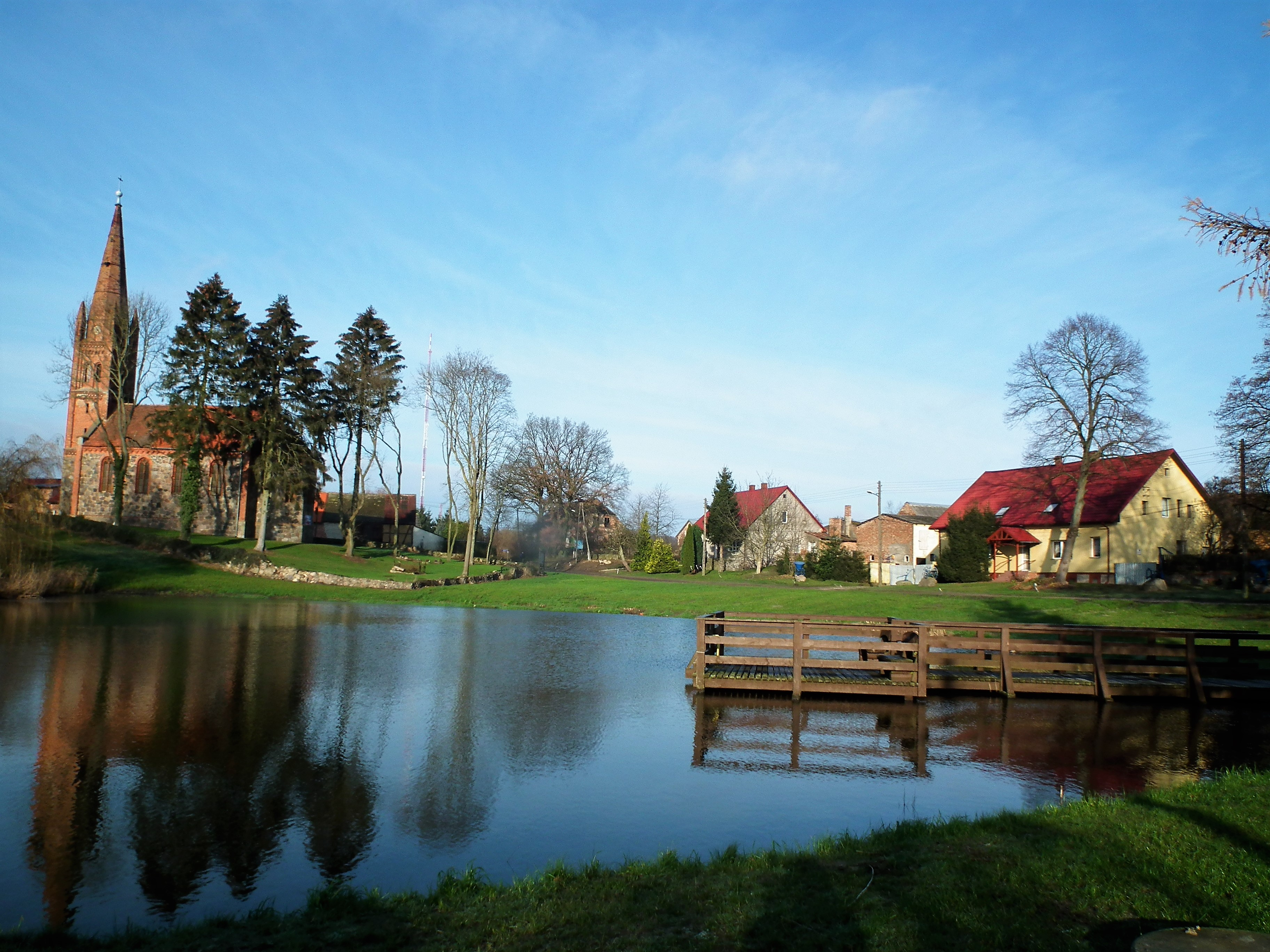 Centrum wsi Kołowo koło Szczecina.